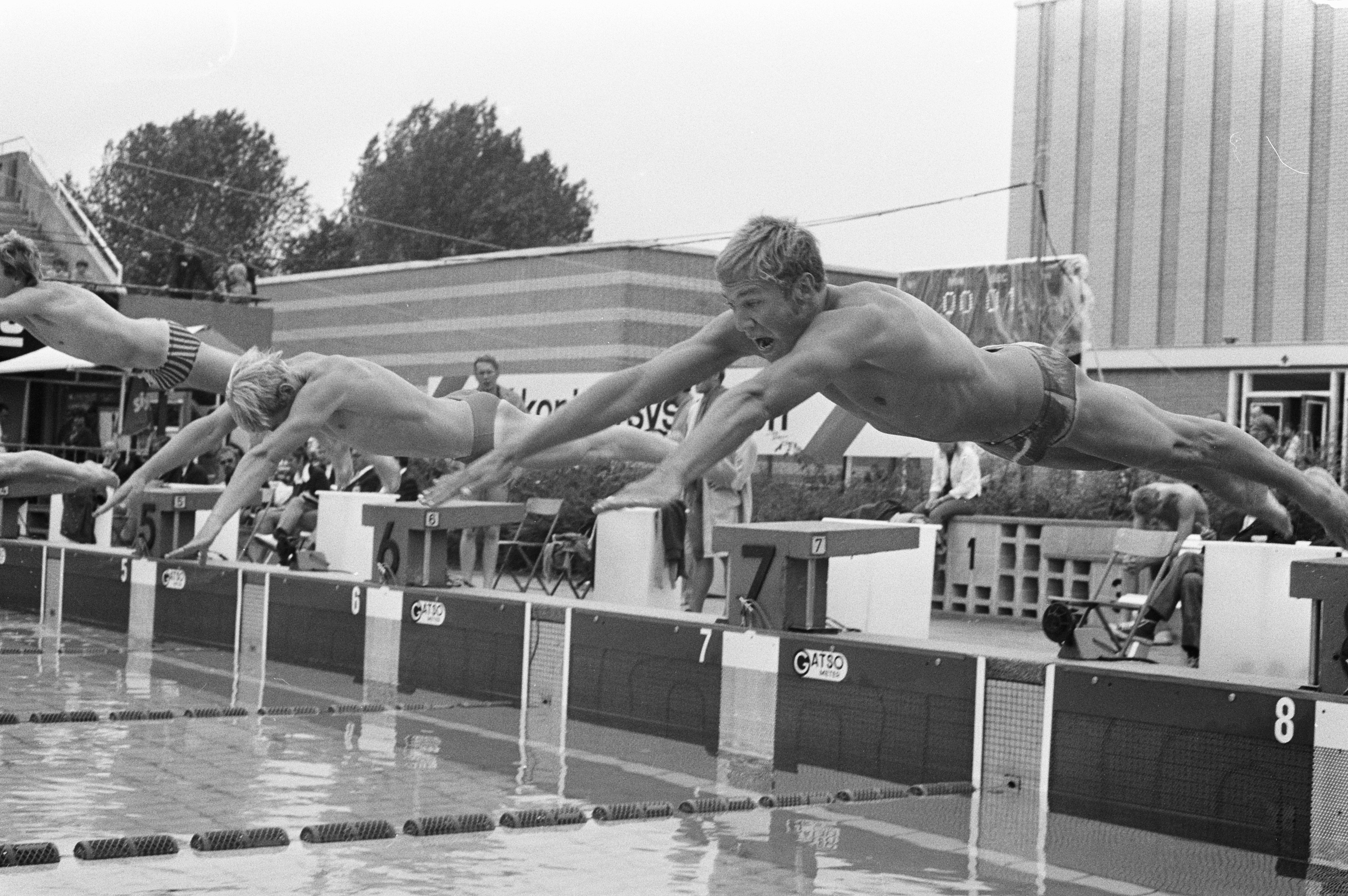 Collectie / Archief : Fotocollectie Anefo Reportage / Serie : [ onbekend ] Beschrijving : Nationale Zwemkampioenschappen te Utrecht, nummer 7 start Peter Prijdekker (rechts) Datum : 25 juli 1972 Locatie : Utrecht Trefwoorden : zwemmen Persoonsnaam : Prijdekker, Peter Fotograaf : Verhoeff, Bert / Anefo Auteursrechthebbende : Nationaal Archief Materiaalsoort : Negatief (zwart/wit) Nummer archiefinventaris : bekijk toegang 2.24.01.05 Bestanddeelnummer : 925-7658